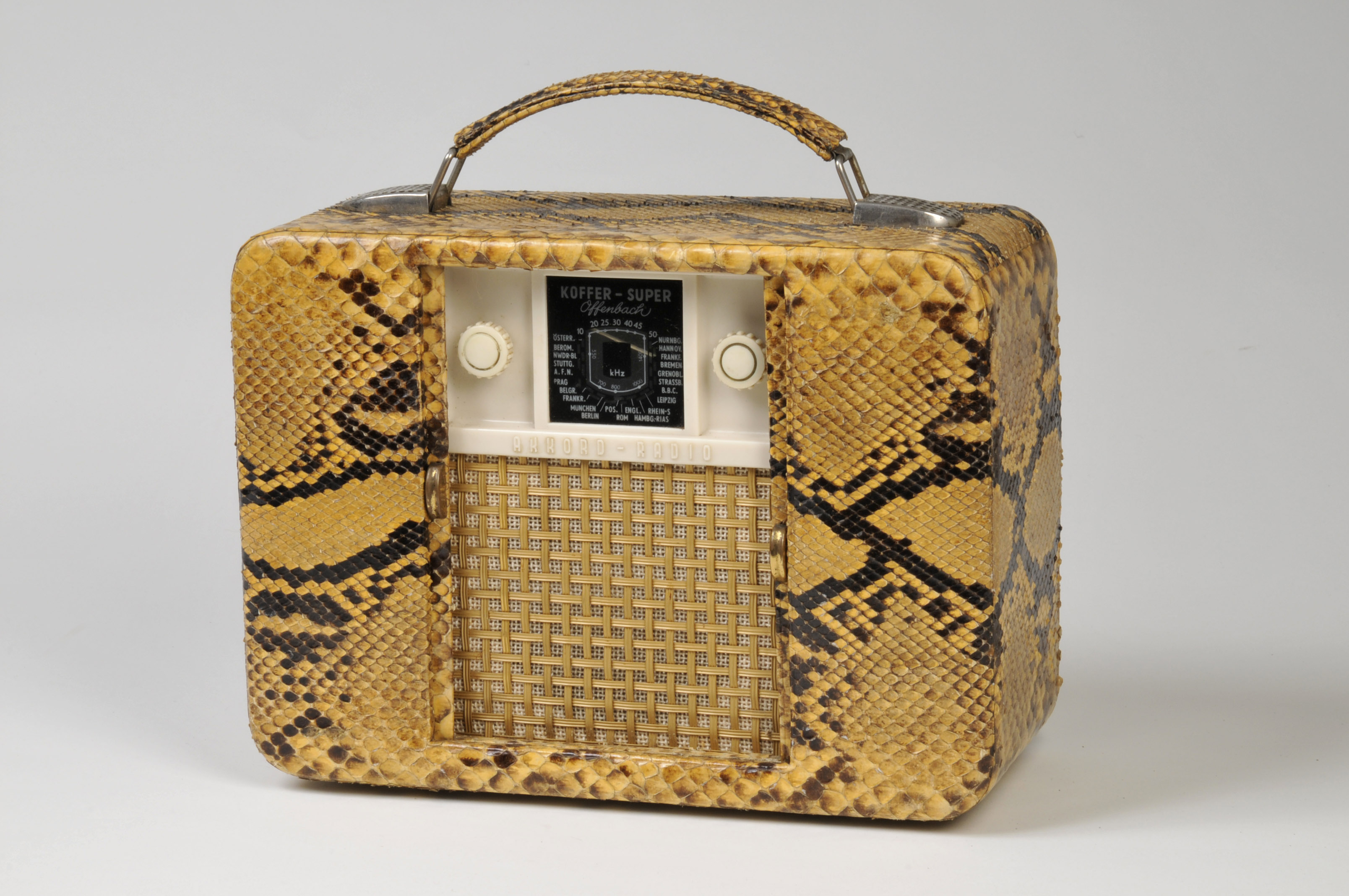 Kofferradio, Modell Offenbach, mit Python-Schlangenleder, Offenbach am Main, 1951 © DLM/C. Perl-Appl